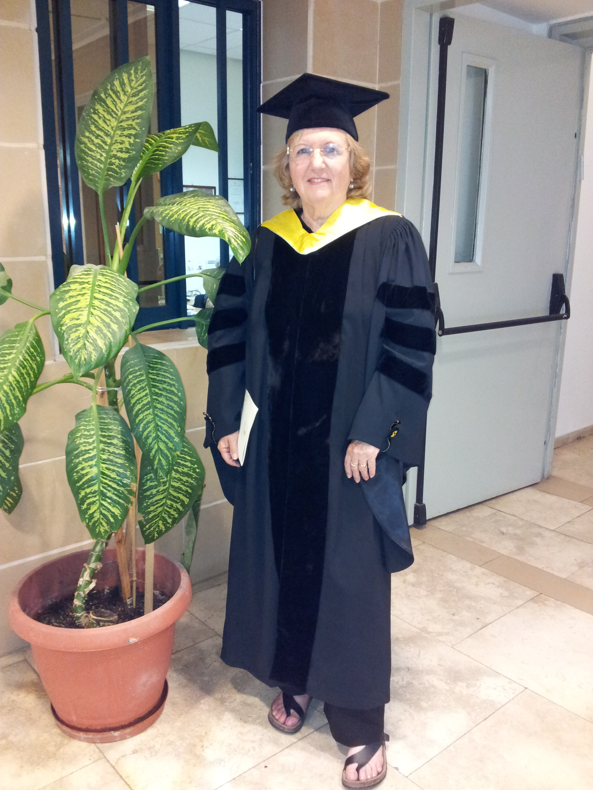 נצה מובשוביץ-הדר